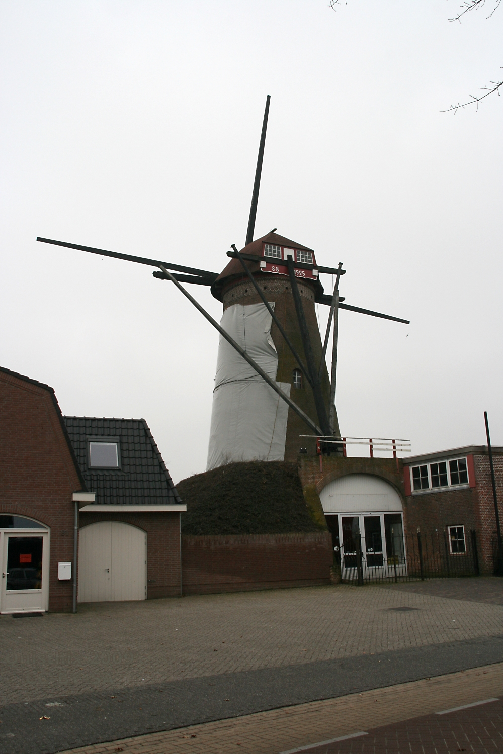 Maaskantje: molen De Pelikaan met kaalgezette roeden en plastic zeilen. Het lijkt in de verte wel op een huisvrouw met een schort aan